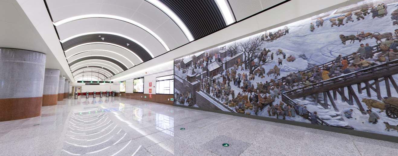 南关站站厅